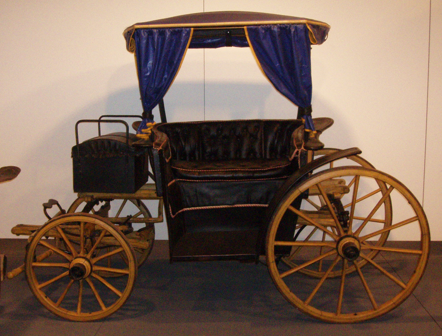 Char-á-Côté, Italien, um 1830